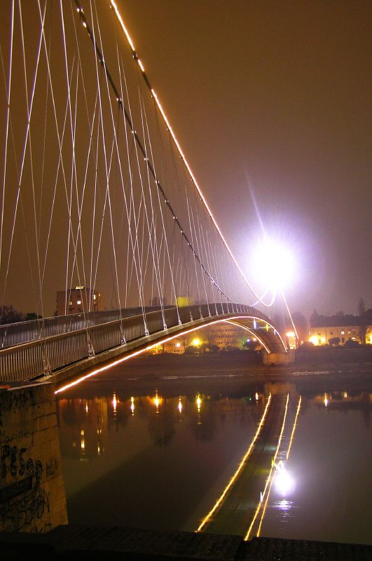 Night over Osijek bridge